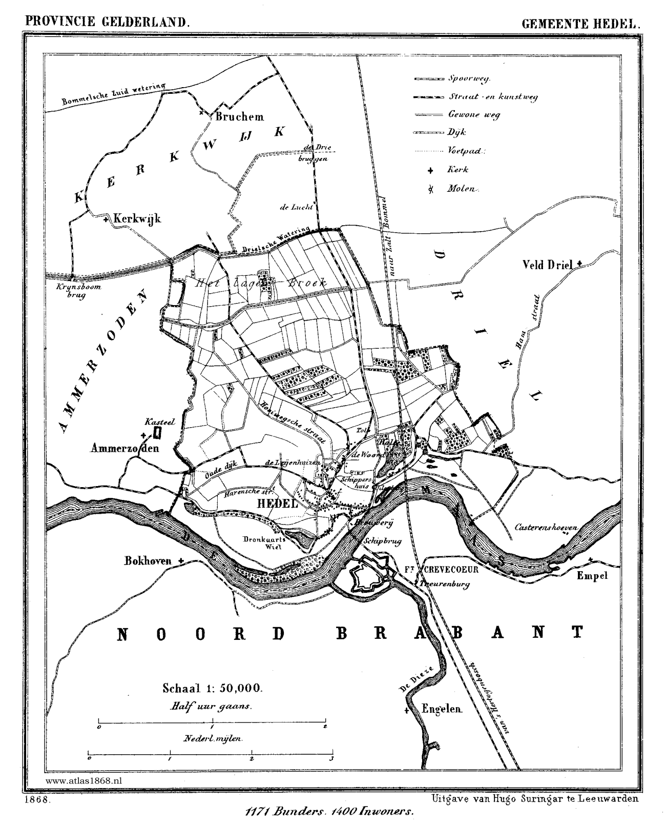 Kaart van Hedel uit Gemeente Atlas van Nederland, J. Kuyper 1865-1870, Uitgave Hugo Suringar Leeuwarden.